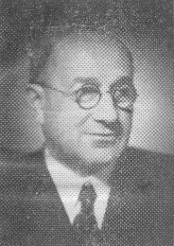 Stanislav Kamarýt (1883 - 1956), Český esperantista a pedagog.